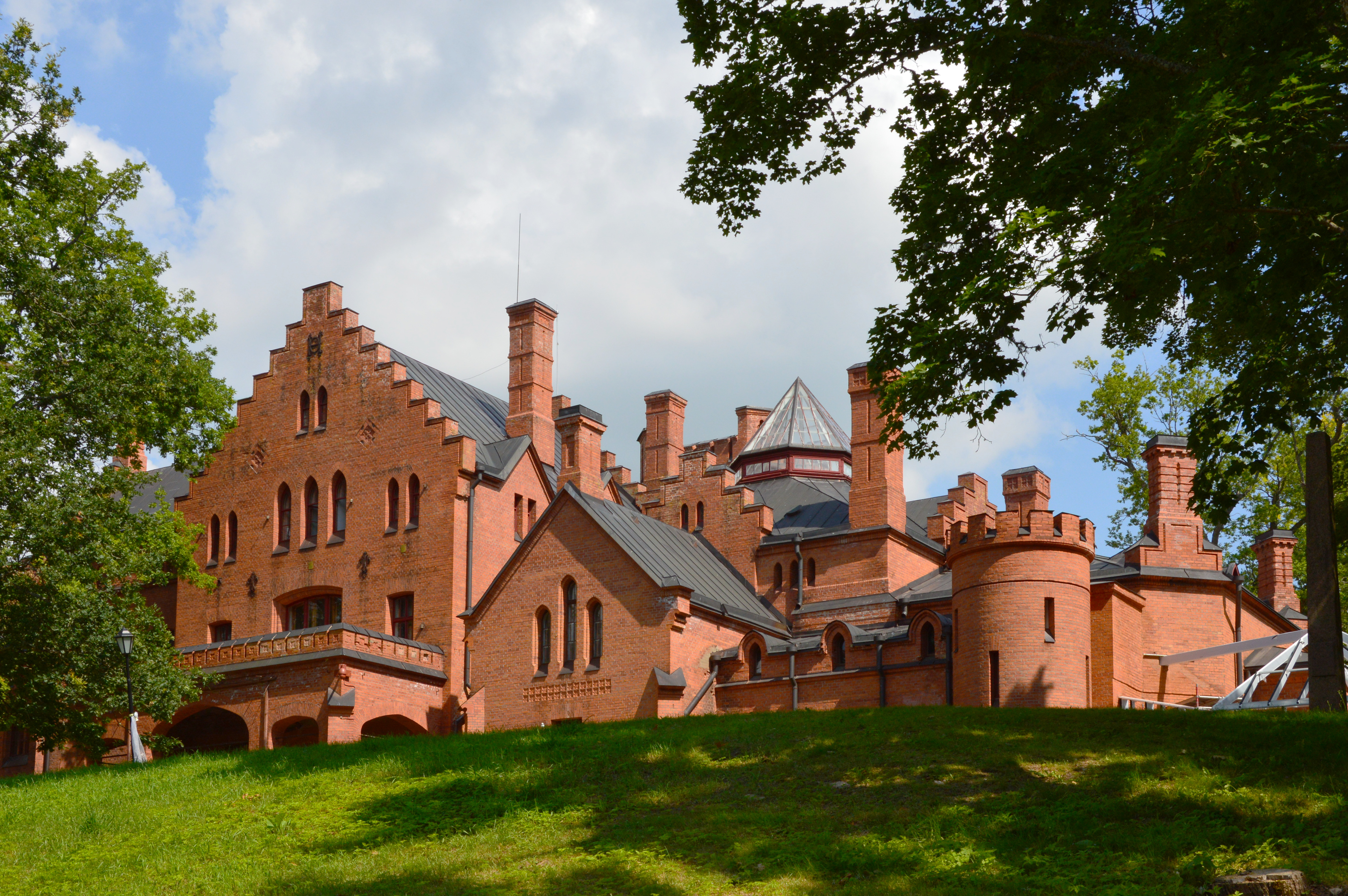 Sangaste mõisa peahoone